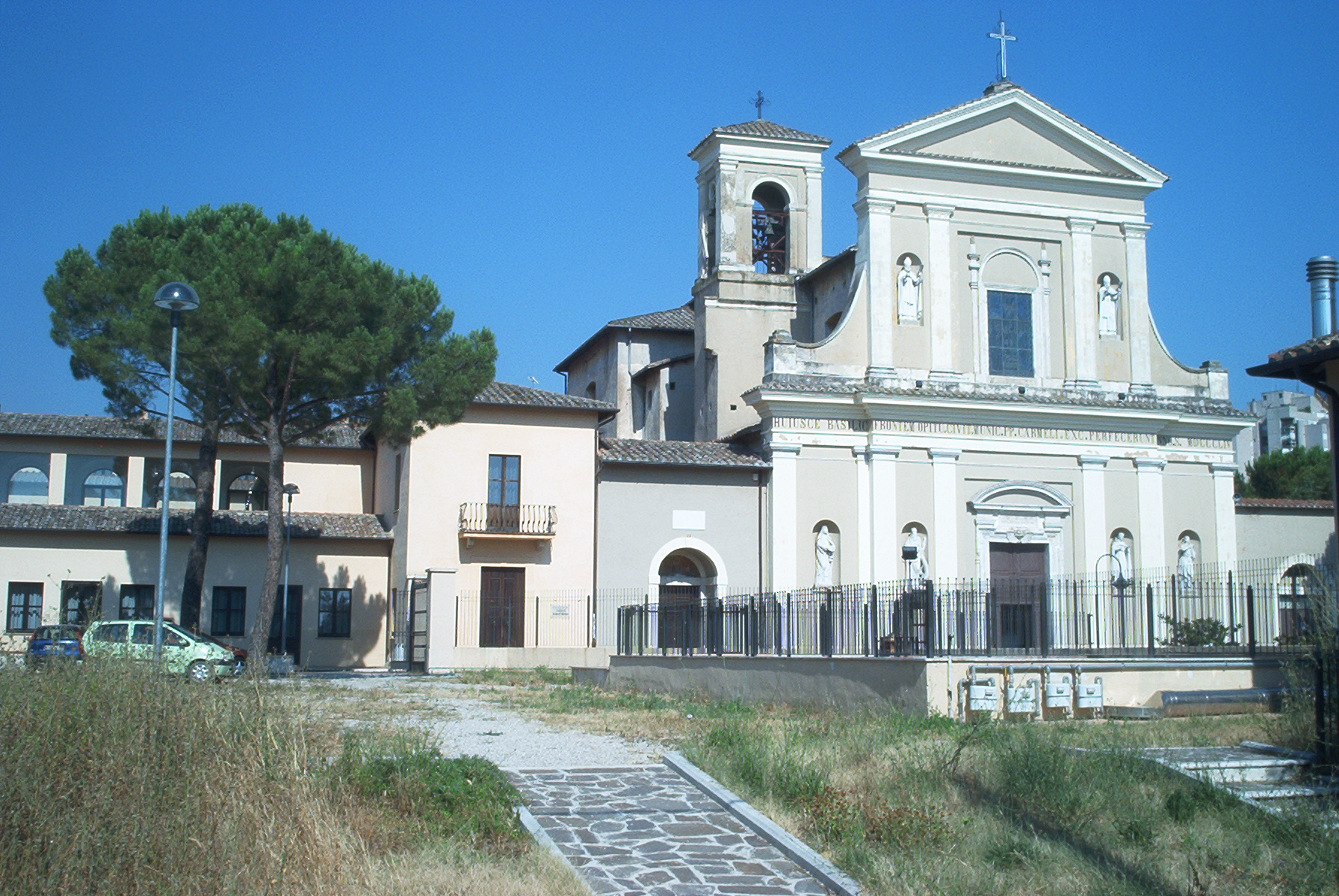 Basilica di San Valentino con affianco il vecchio convento restaurato che oggi ospita la facoltà di Scienze Politiche della locale Università, Terni.